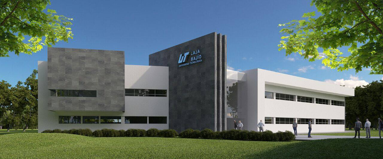 Edificio Rectoria